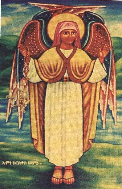 አማርኛ: kidist-kirstos-semera